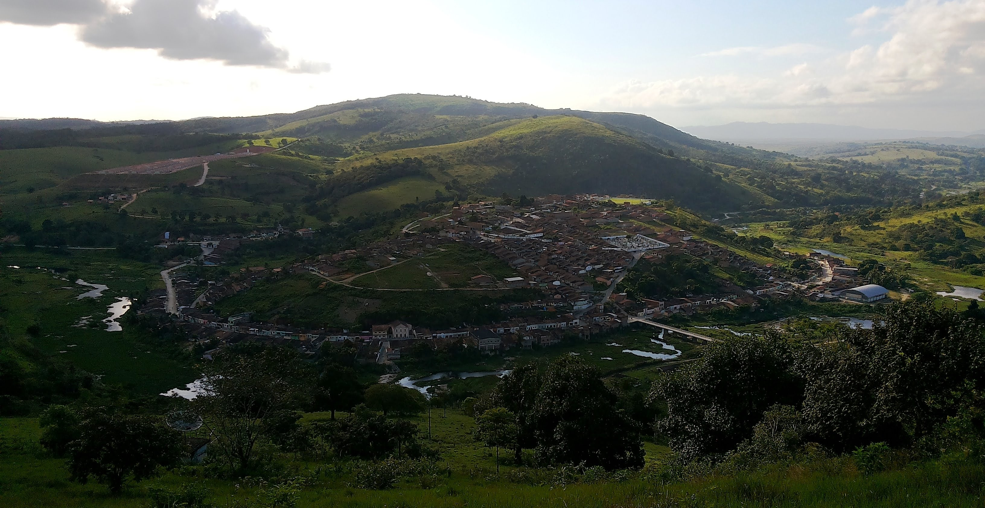 Batateira, Pernambuco, Brasil - AUTORIZO A REPRODUÇÃO E DIVULGAÇÃO TOTAL OU PARCIAL DESTE TRABALHO, POR QUALQUER MEIO CONVENCIONAL OU ELETRÔNICO, PARA FINS DE PUBLICAÇÕES E PESQUISAS, DESDE QUE CITADA A FONTE.